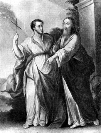 "А. С. Пушкин и В. И. Даль в виде святых Косьмы и Дамиана". Икона XIX в.